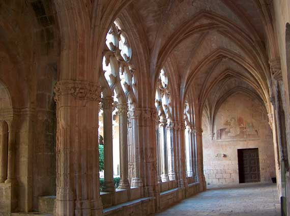 Interior del claustro del Monasterio de Santes Creus